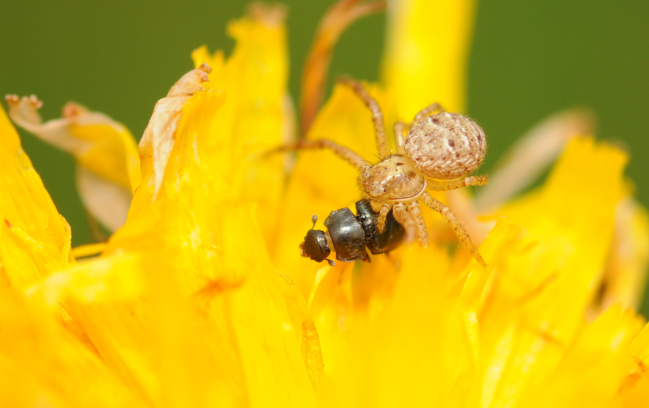 Thomise sur une fleur mangeant un coléoptère.